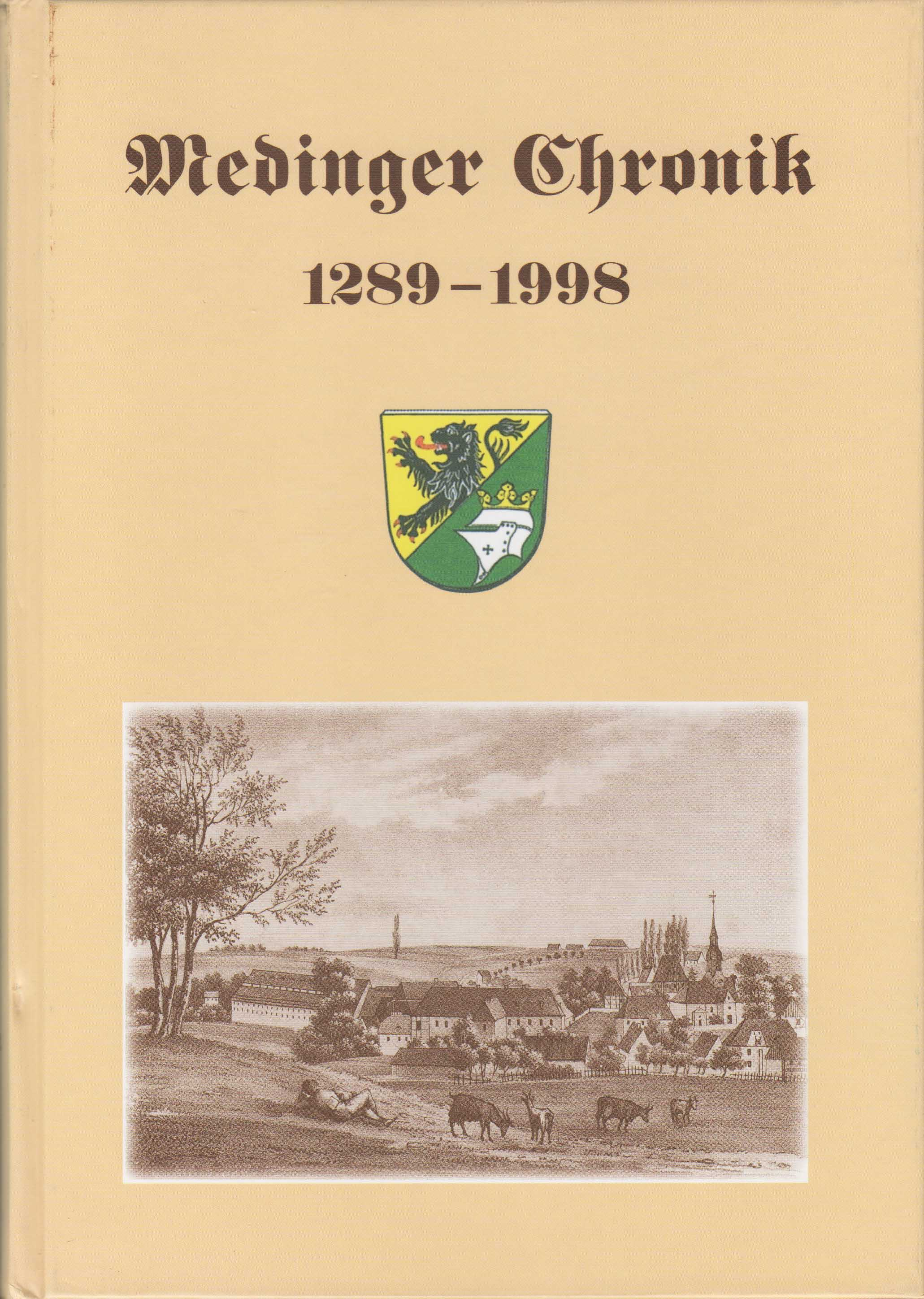 Buch Medinger Chronik